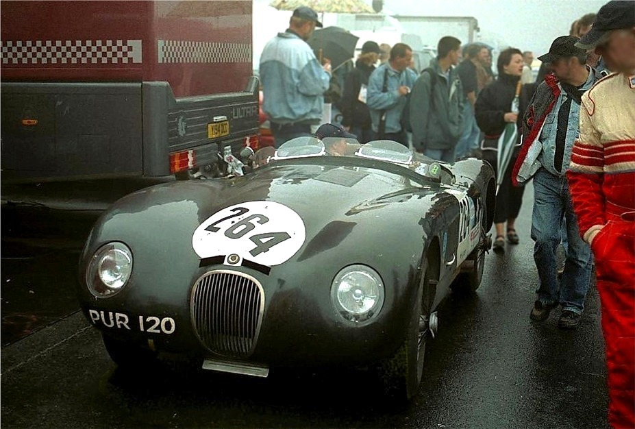 Jaguar C-Type, Baujahr 1953